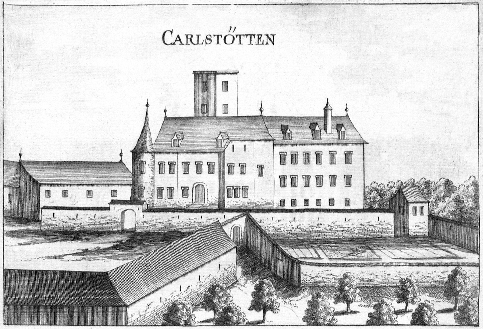 Alter Stich des Schlosses Karlstetten, Niederösterreich